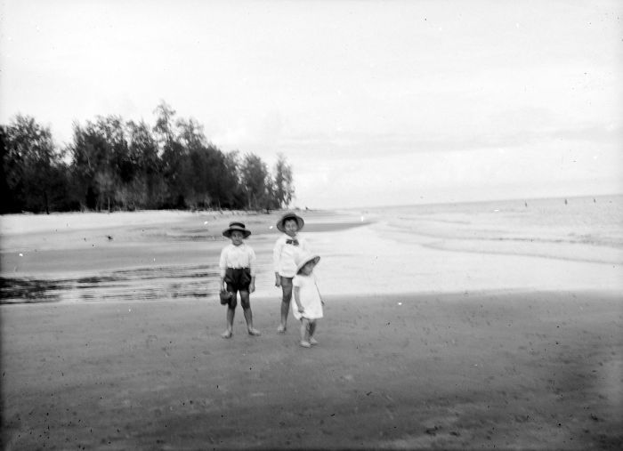 Negatief. Europese kinderen op het strand bij Perbaoengan